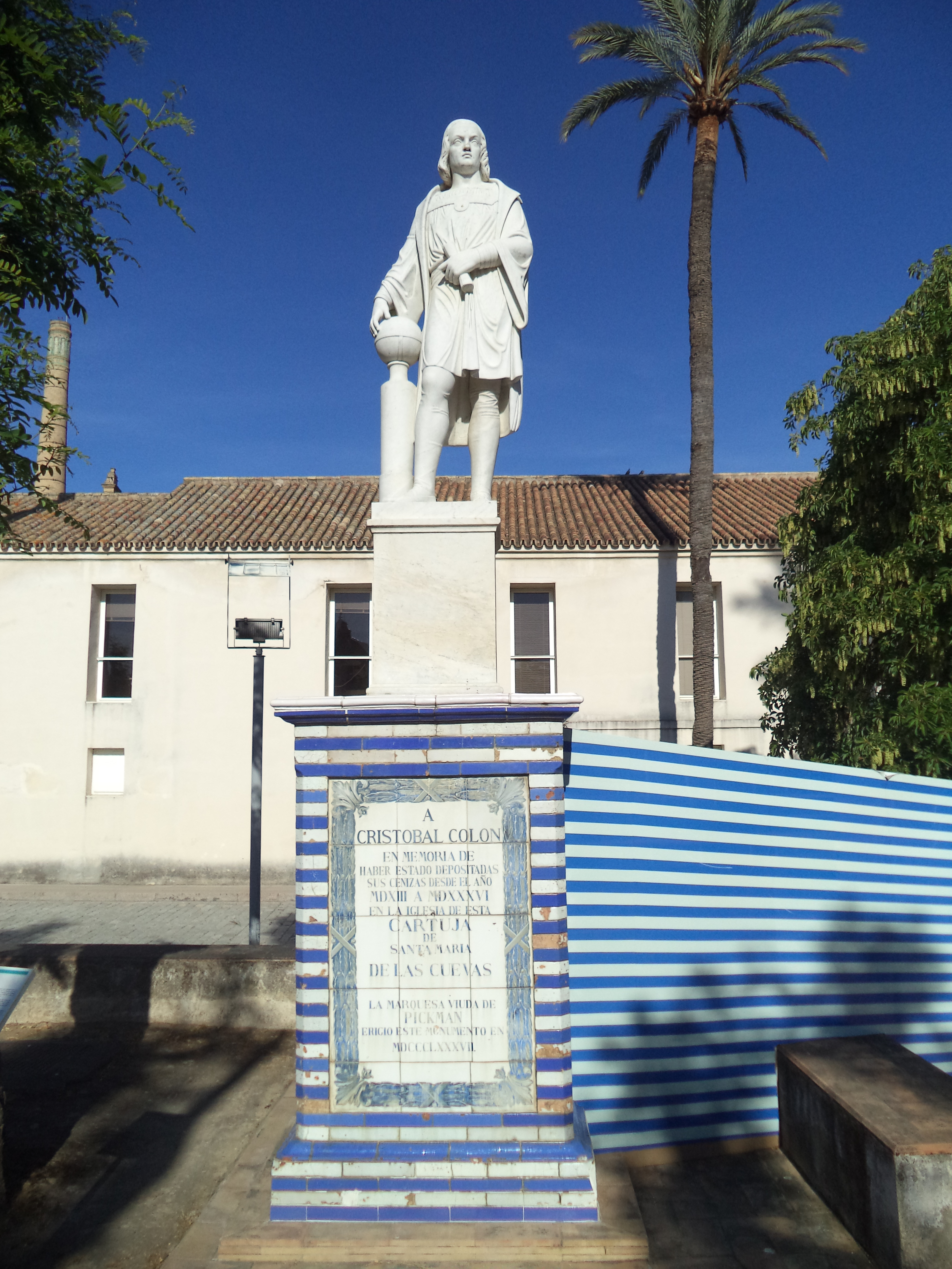 Monumento a Colón en la Cartuja, colocado por la marquesa de Pickman en 1887